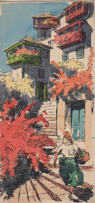 Dibuix acolorit de la col·lecció de Cànaries